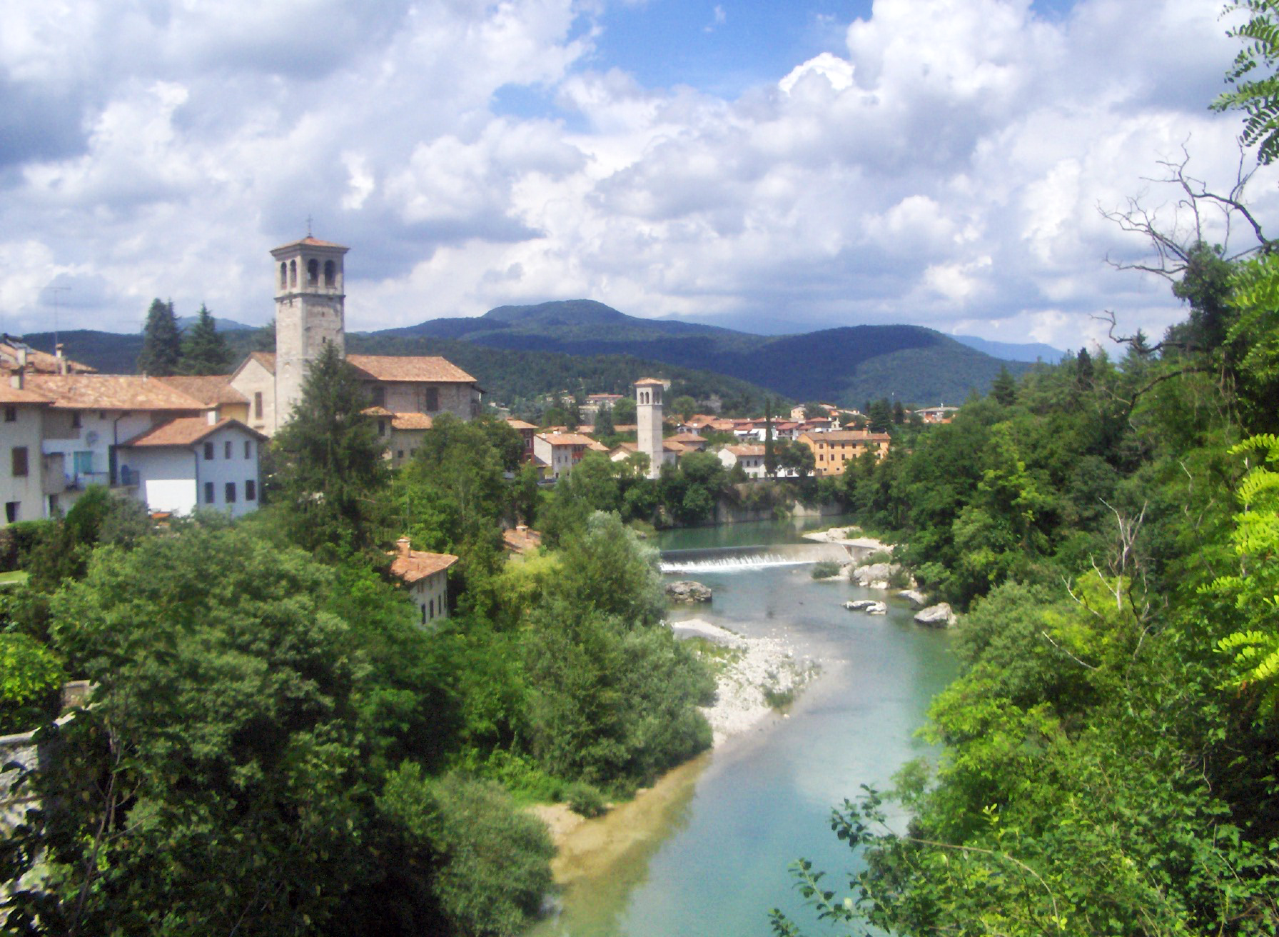 Sebi1, Cividale del Friuli - panorama col fiume Natisone